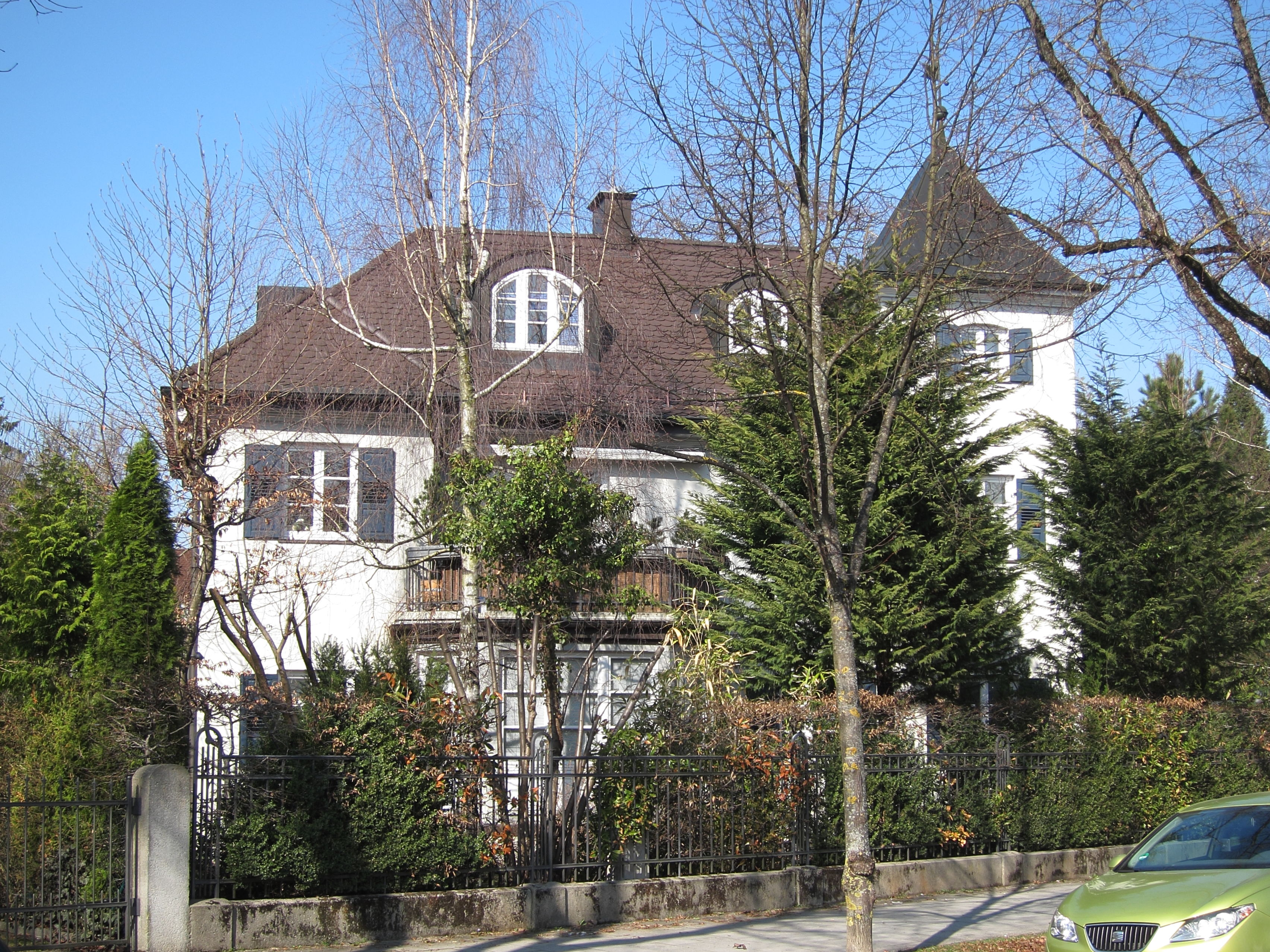 August-Exter-Straße 19; Malerische Villa, mit Turm, im Kern um 1895 aus dem Büro August Exter.